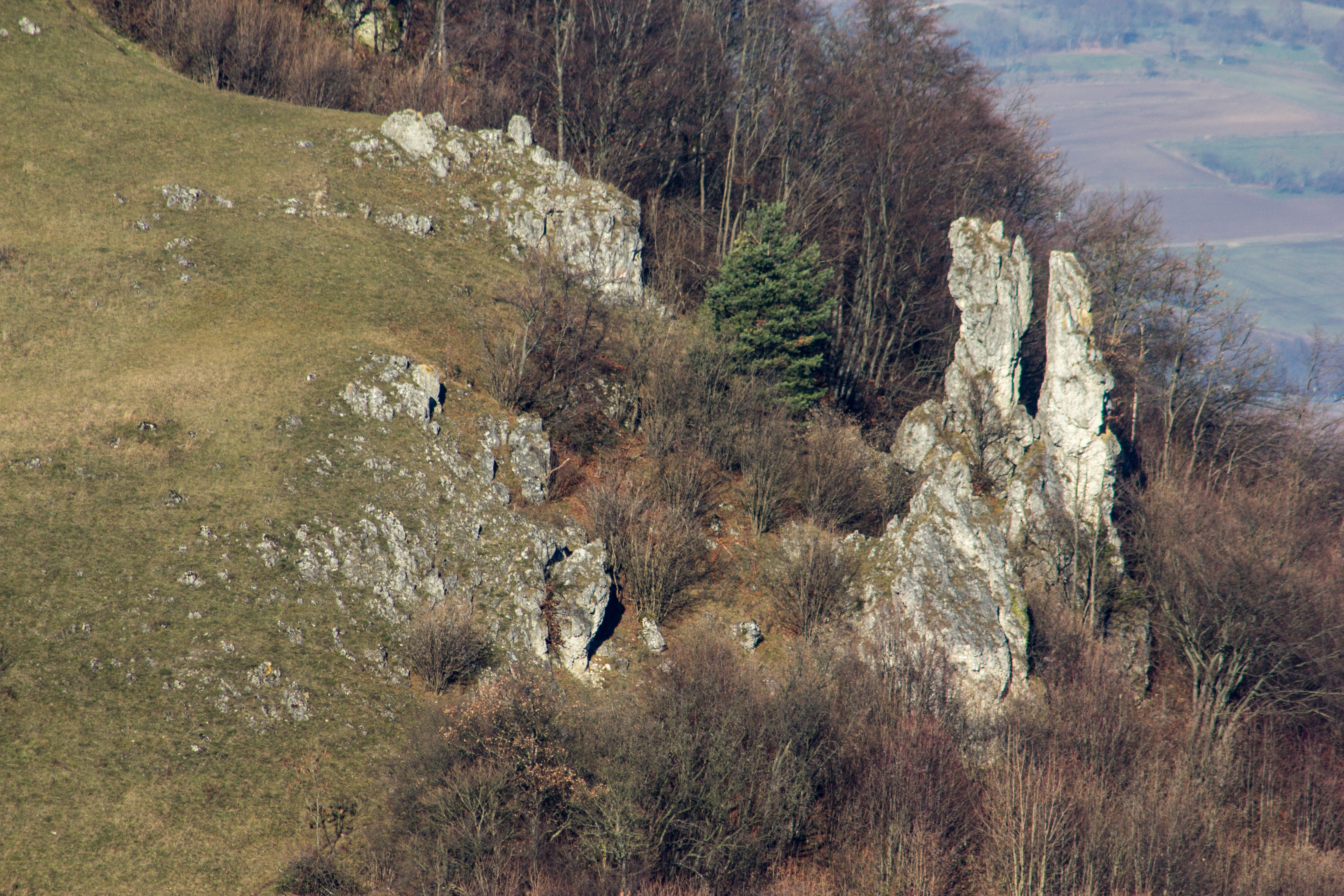 Ehrenbürg, Walberla, Zwillingsfelsen